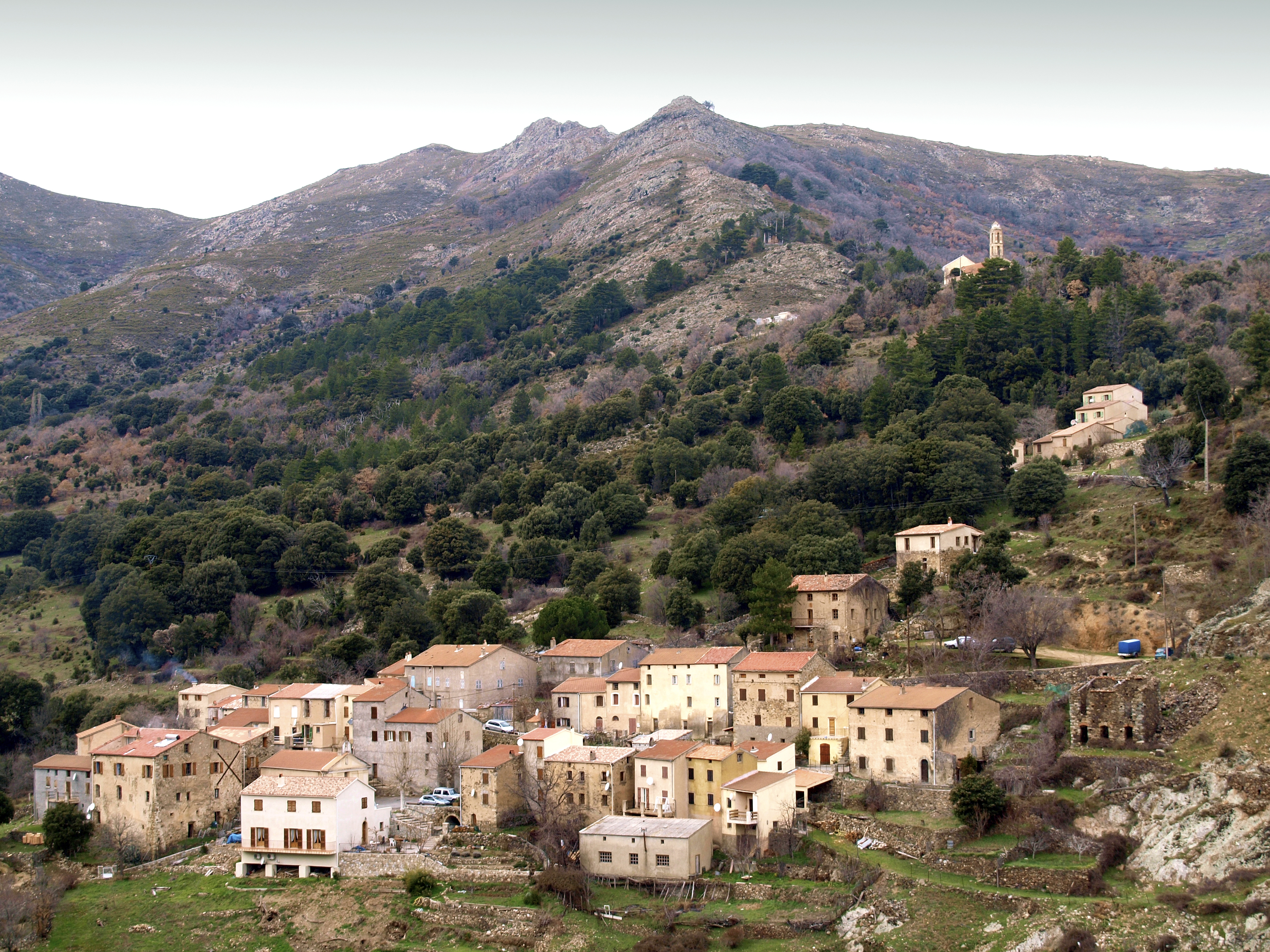 Pioggiola (Corsica) - Hameau de Forcili